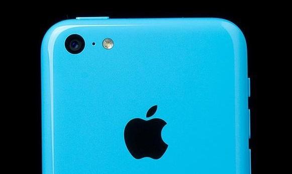 Foto da câmera de 8MP do iPhone 5C